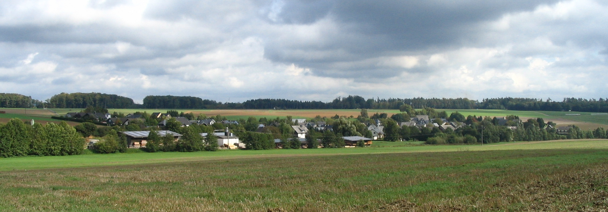 Klosterkumbd (Hunsrück) aus süd-westlicher Richtung